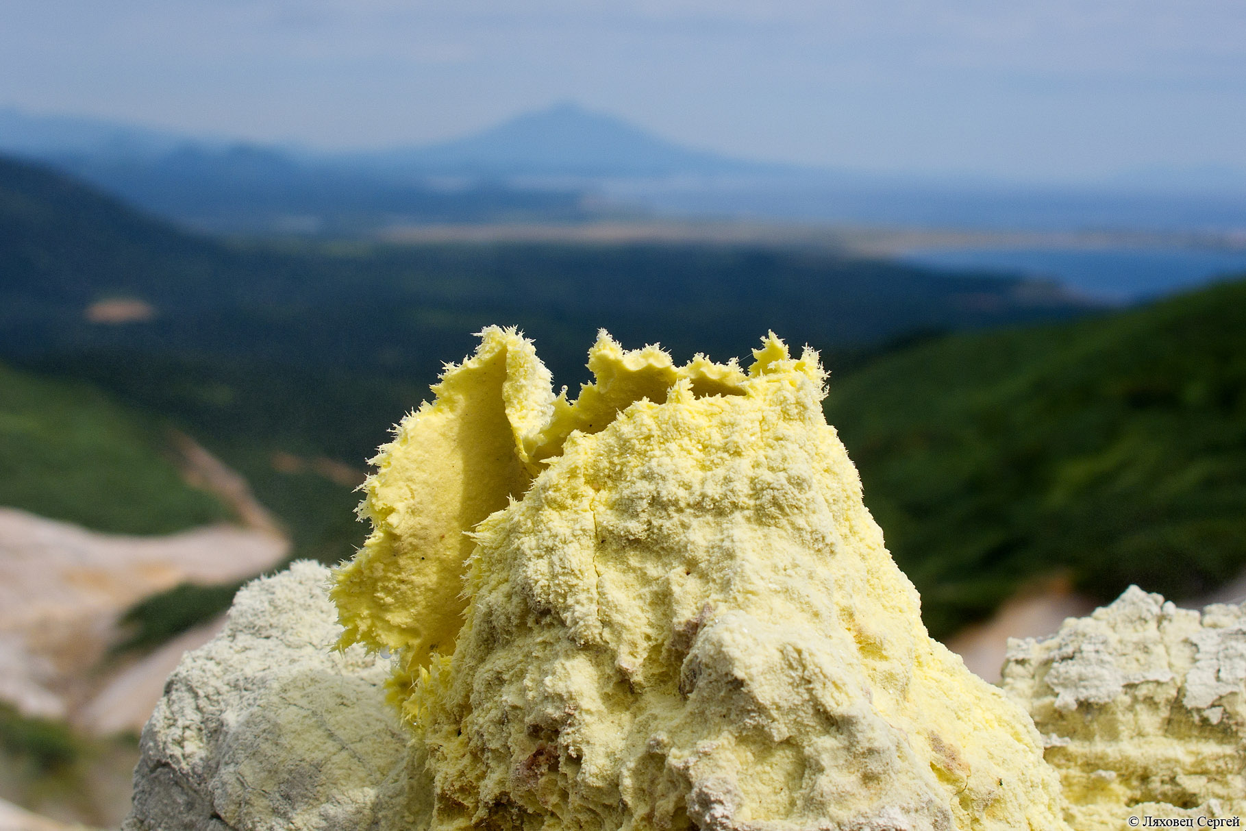 Вулкан Менделеева: Центр - 43°58'38" N 145°44'22" E.,Южно-Курильский городской округ, Сахалинская область This image is related to the protected area of Russia number 6510088